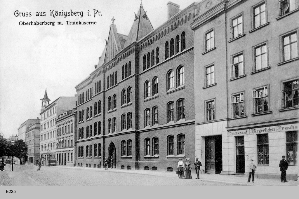 Königsberg